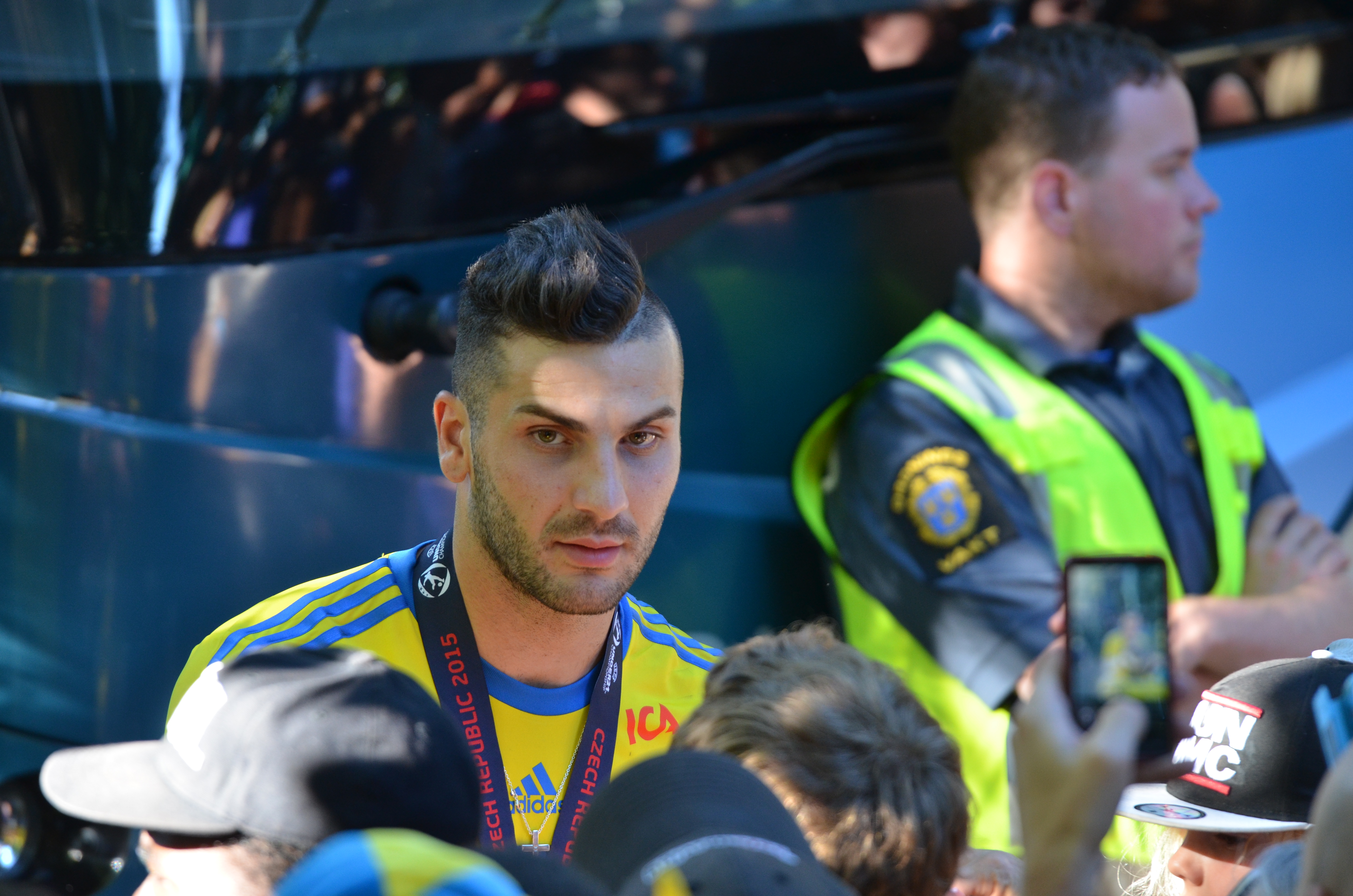 Firande av U21 EM-guldet, efter en bussresa genom Stockholm till Kungsträdgården där det var underhållning och lagpresentation avslutade spelarna med att skriva autografer och ta bilder tillsammans med fans.